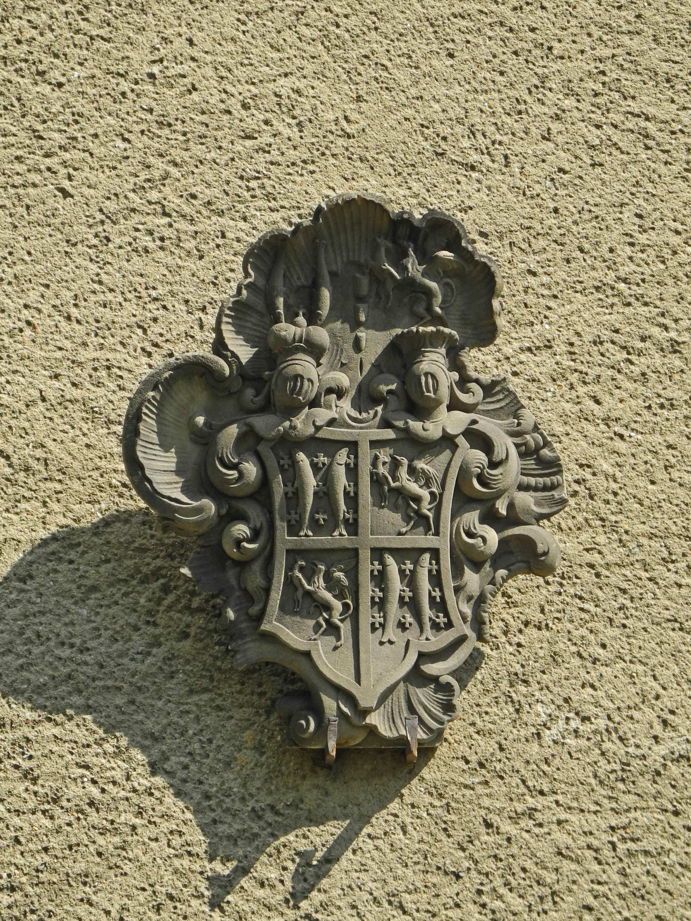 Wappen am Museum in Weißwasser in Schlesien (Bílá Voda)